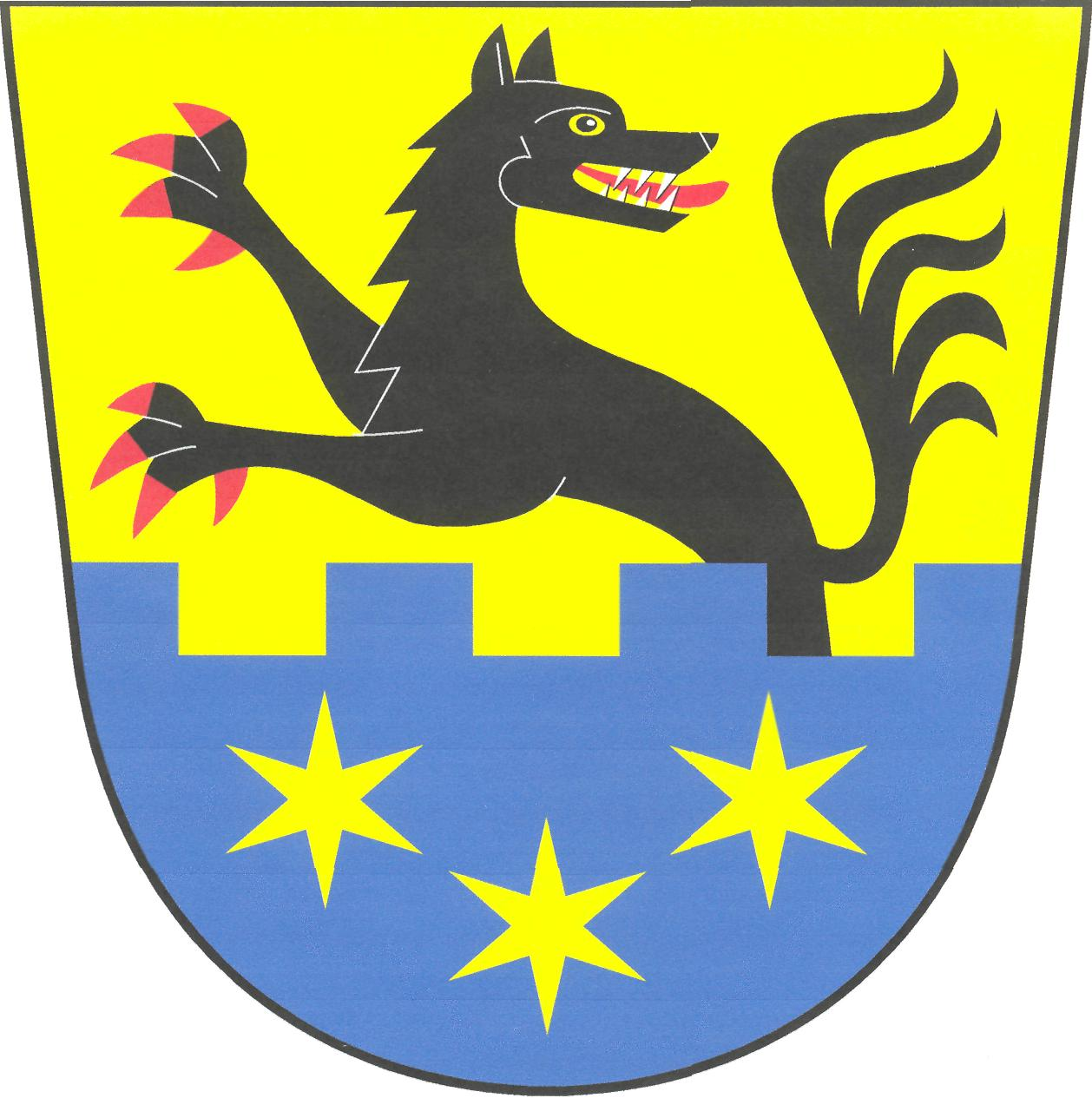 Znak obce Volfartice